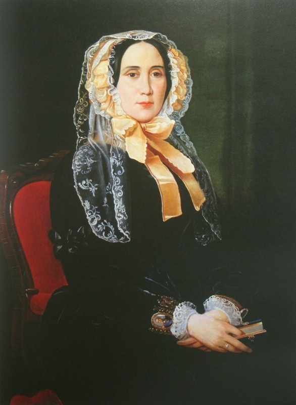 Портрет Ю.М. Грейг